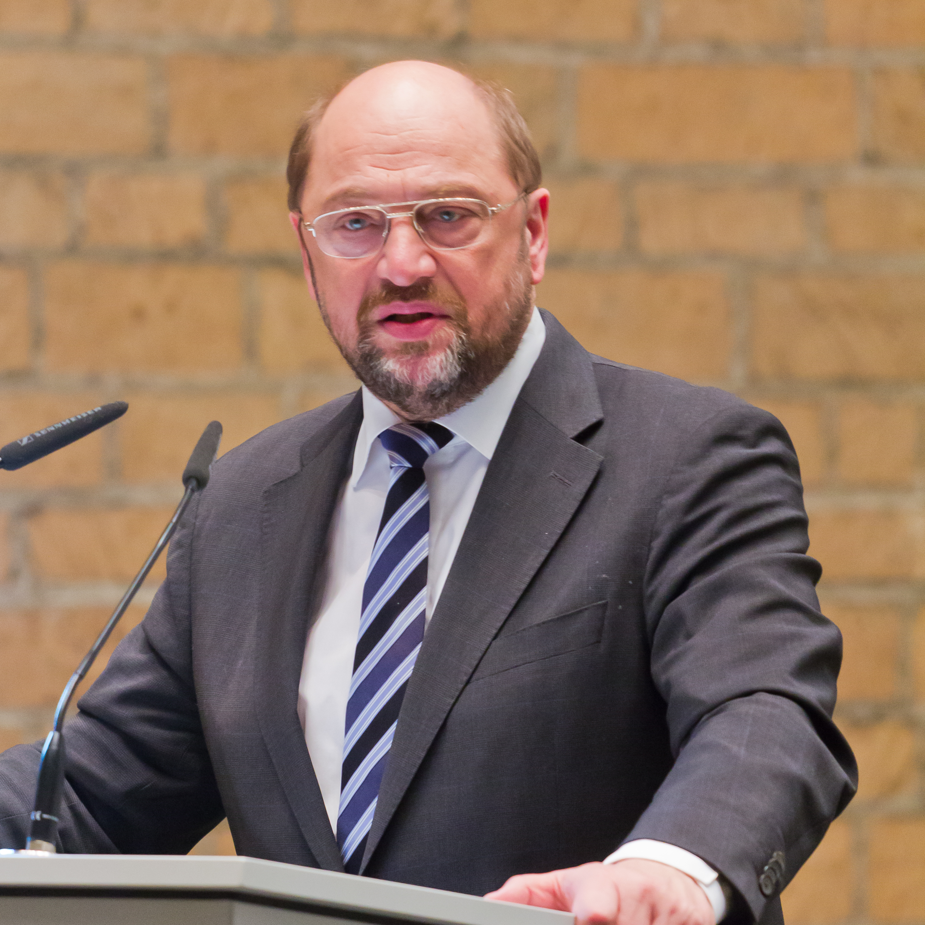 Am 14. Dezember 2013 fand im Historischen Rathaus zu Köln der Festakt zu 500 Jahre Kölner Transfixbrief statt: Am 15. Dezember 1513 haben die Stadt Köln und die 22 Gaffeln den sogenannten Transfixbrief als Zusatz zum Verbundbrief von 1396 ausgefertigt. Als Festredner schlug Martin Schulz, Präsident des Europäischen Parlaments, die Brücke zwischen den ersten Ansätzen von Bürgerrechten zu unserer heutigen Demokratie. Foto: Festrede von Martin Schulz